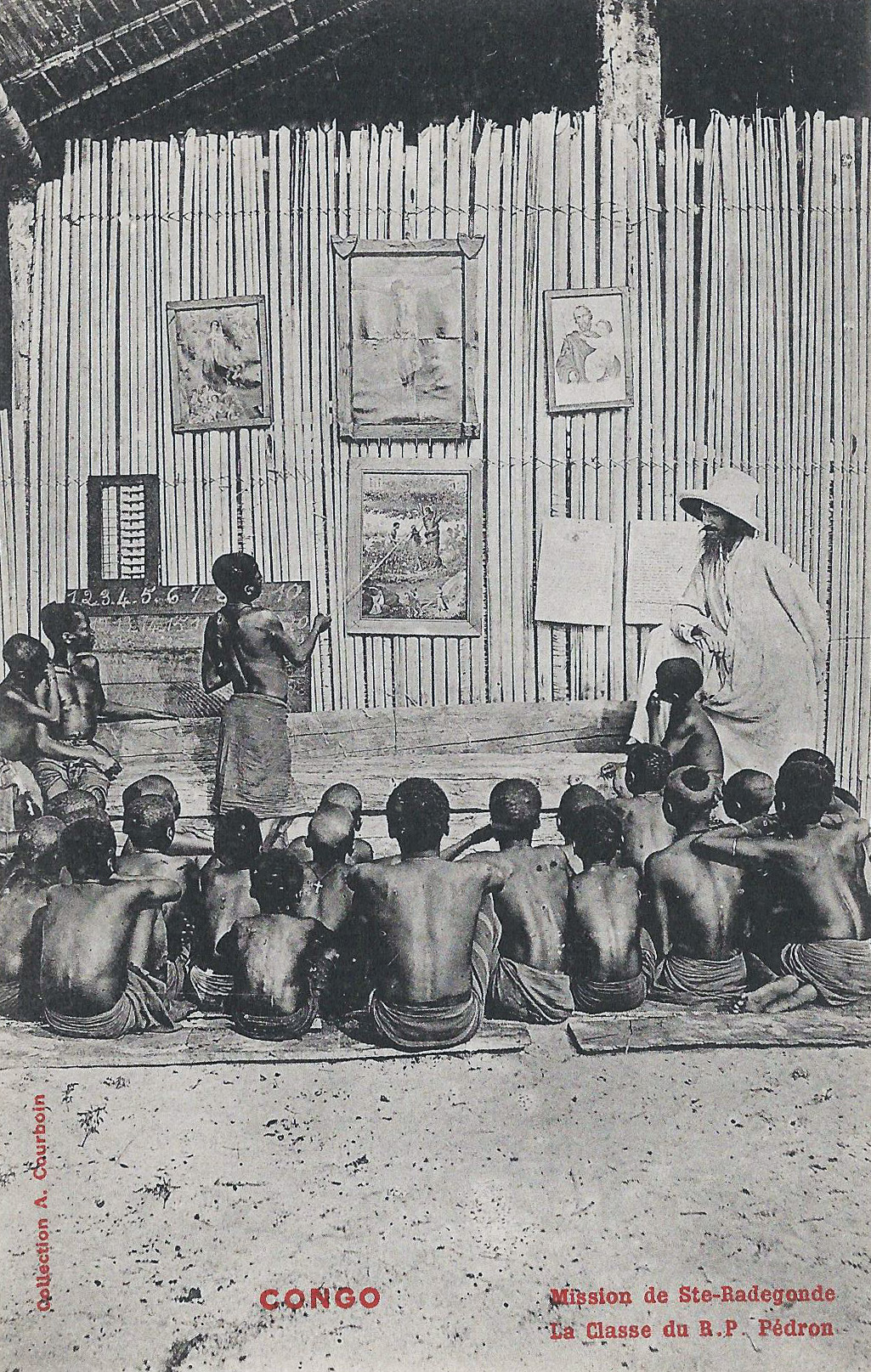 Mission de Sainte-Radegonde. La classe du R. P. Pédron. [Marc Pédron, 1877-1936] Collection A. Courboin Congo